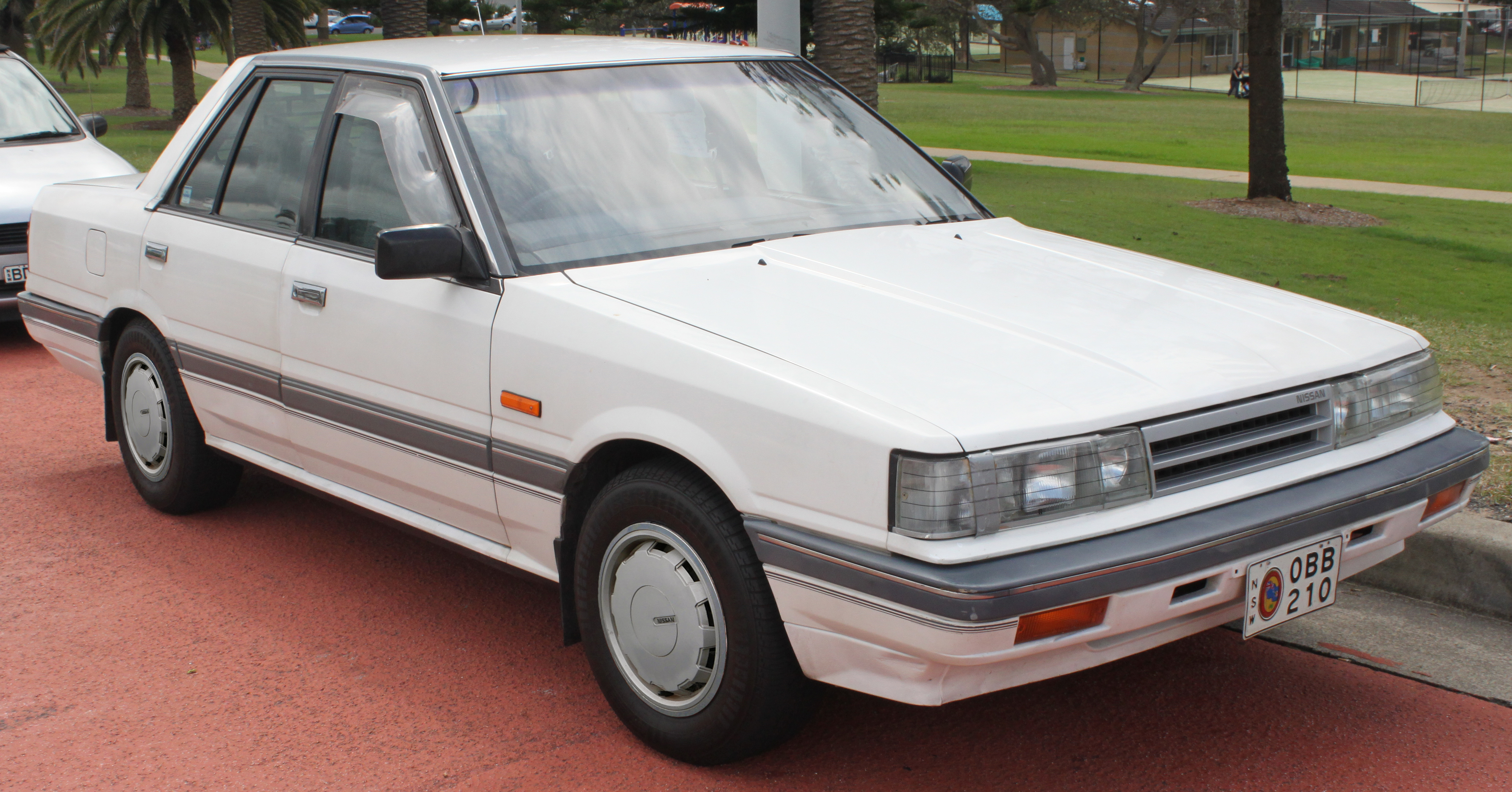 Nissan Skyline R31 GXE